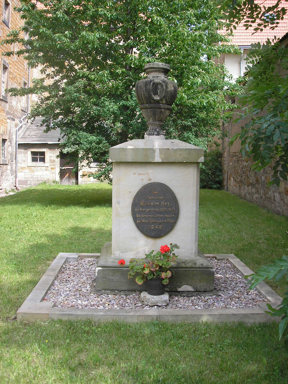 Das Wilhelm-Hey-Denkmal in Ichtershausen (Thüringen).